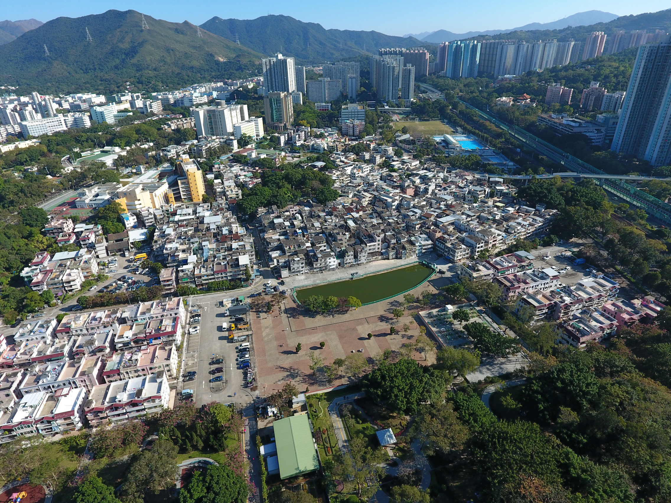 Fanling Wai